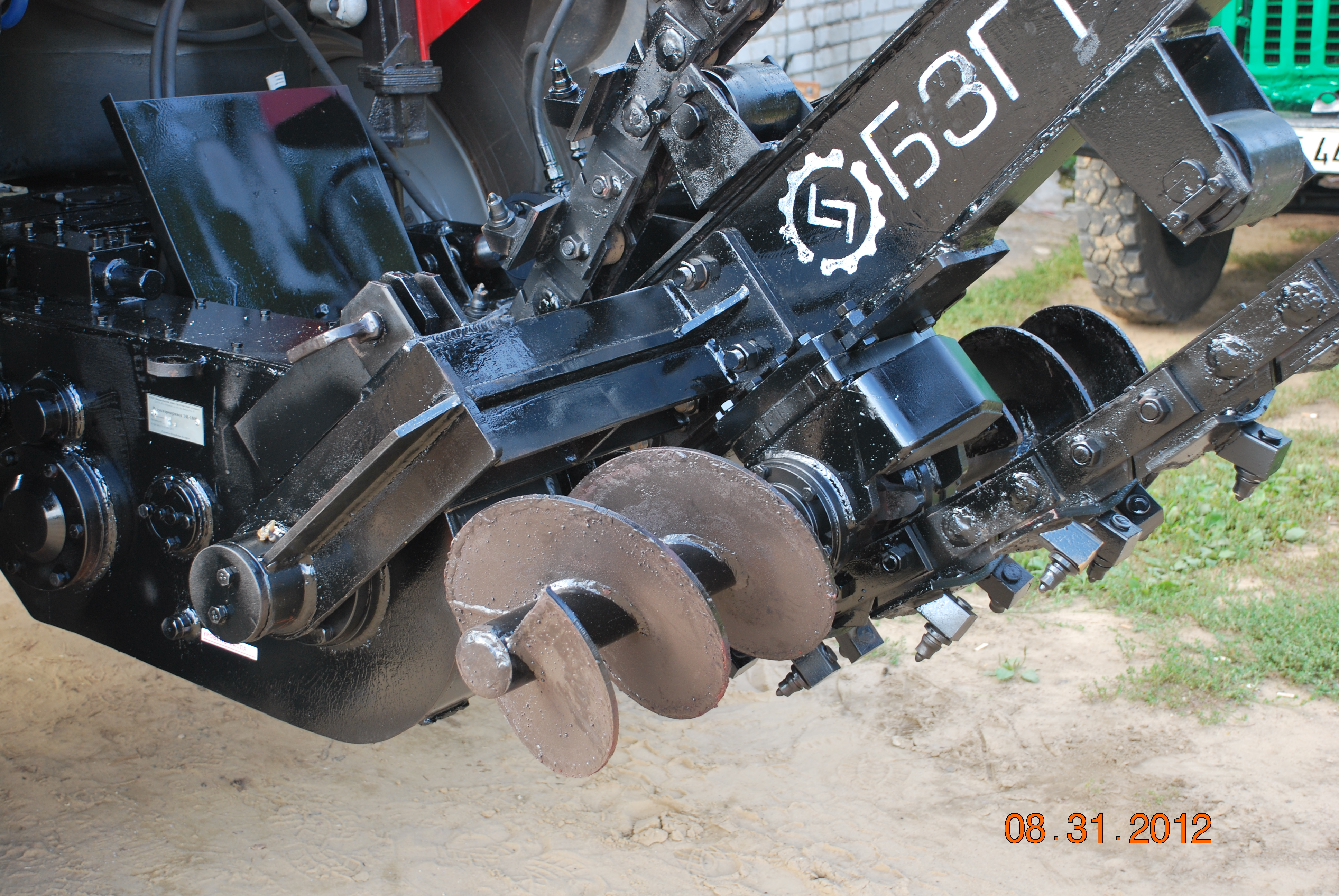 Шнековый узел в цепной экскаваторе траншеекопателе баре, необходим для удаления земли от края траншеи